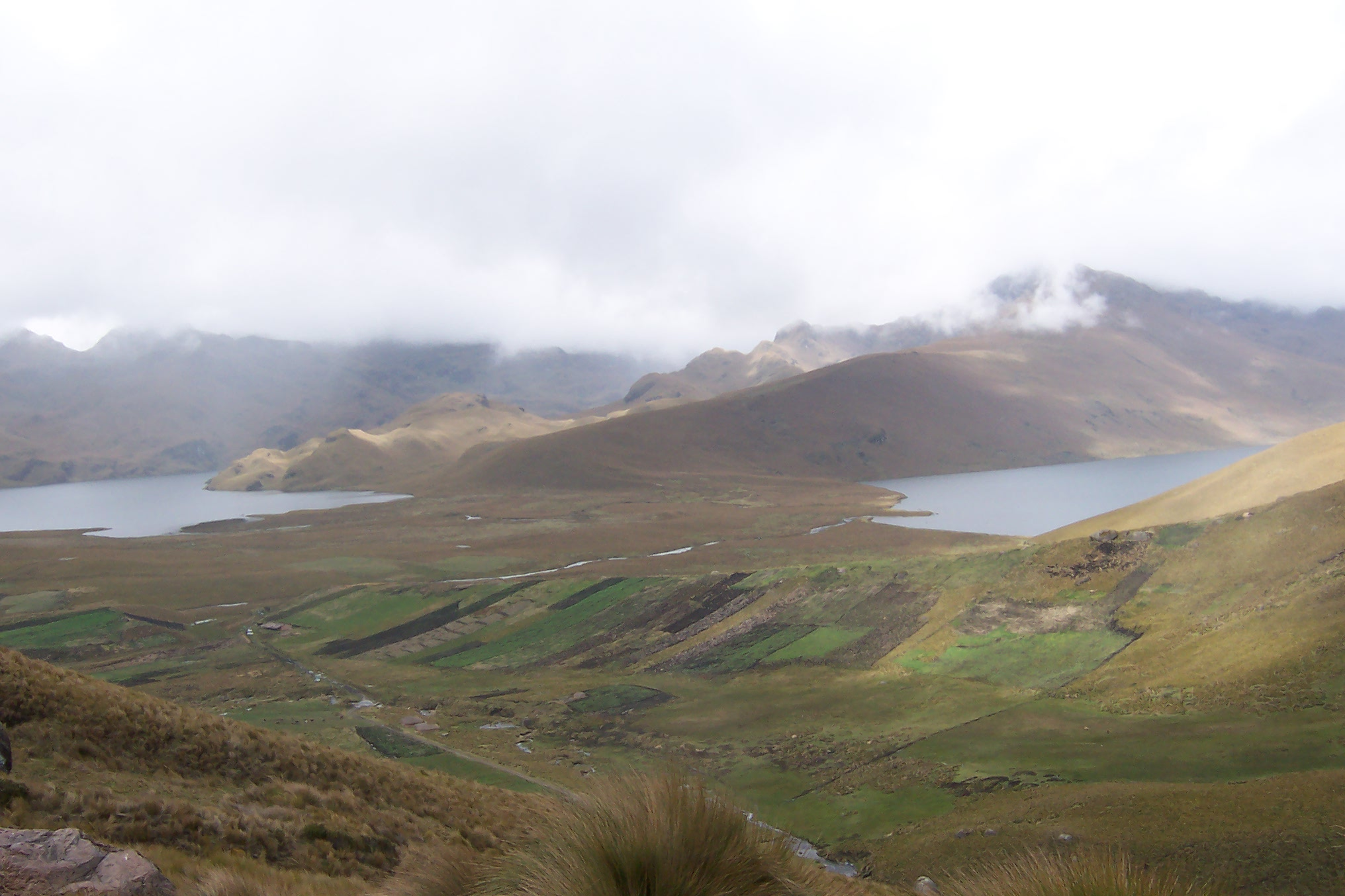 Complejo de lagunas de Ozogoche, Parque Nacional Sangay, Provincia de Chimborazo, Ecuador, aprox 3800 msnm.